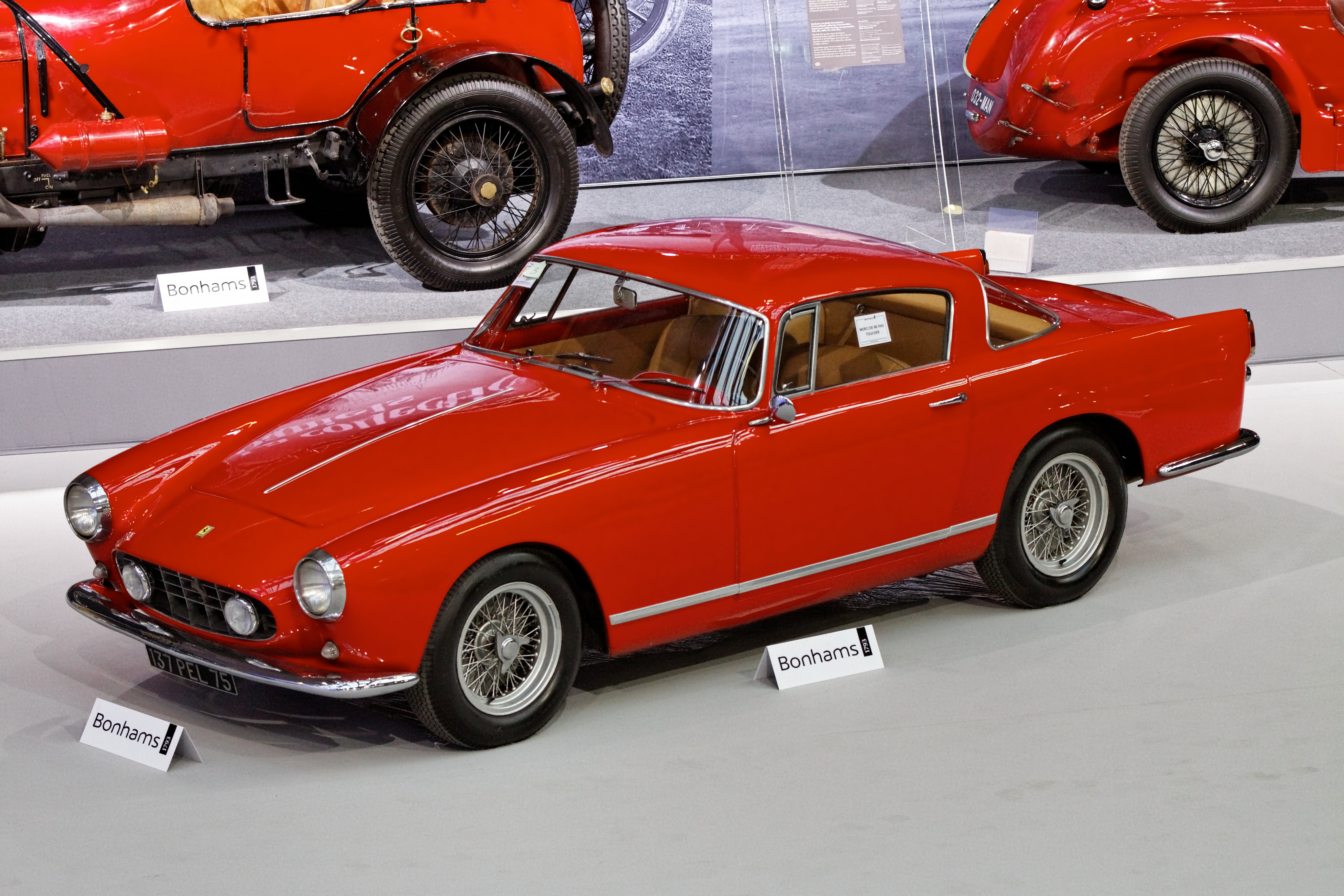 Ferrari 250GT Berlinetta